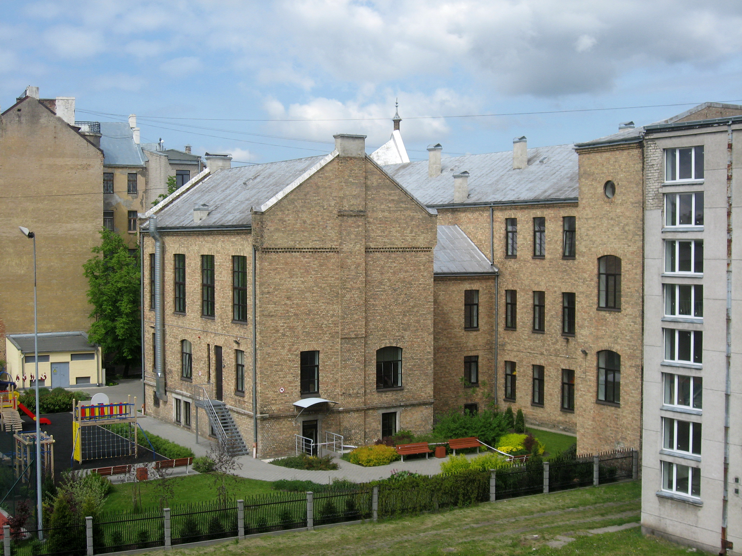 Riga, budova ukrajinské školy